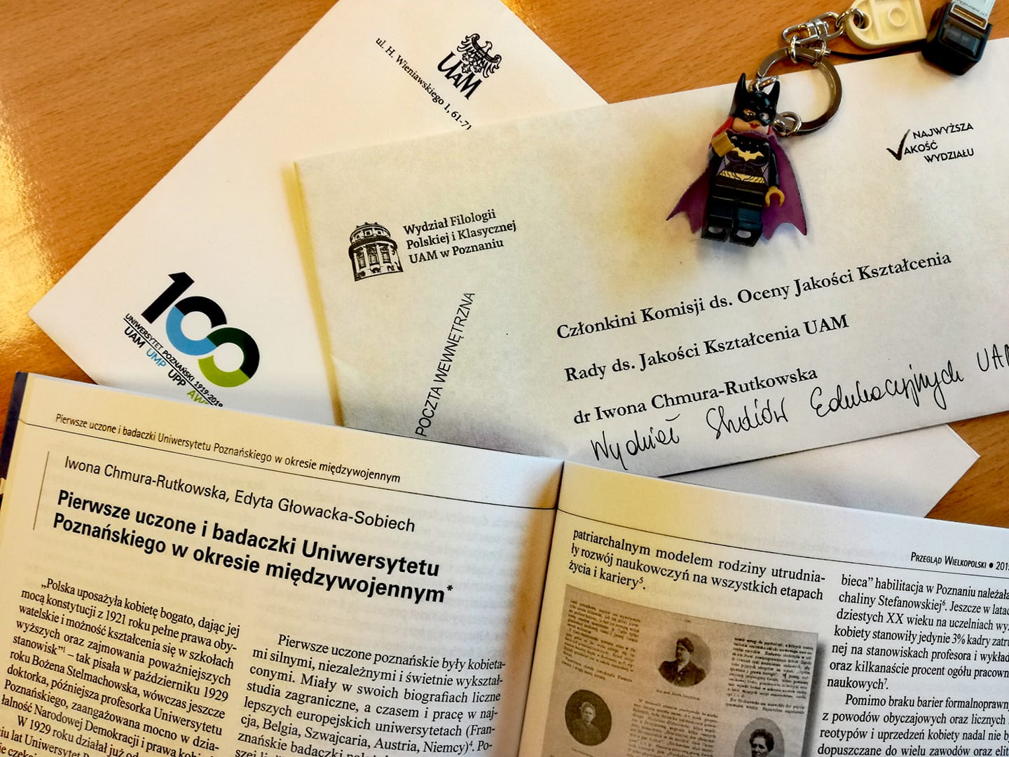 Artykuł, który powstał w ramach projektu "Mądrość, odwaga i entuzjazm. Pierwsze Uczone Uniwersytetu Poznańskiego 1919-1939"